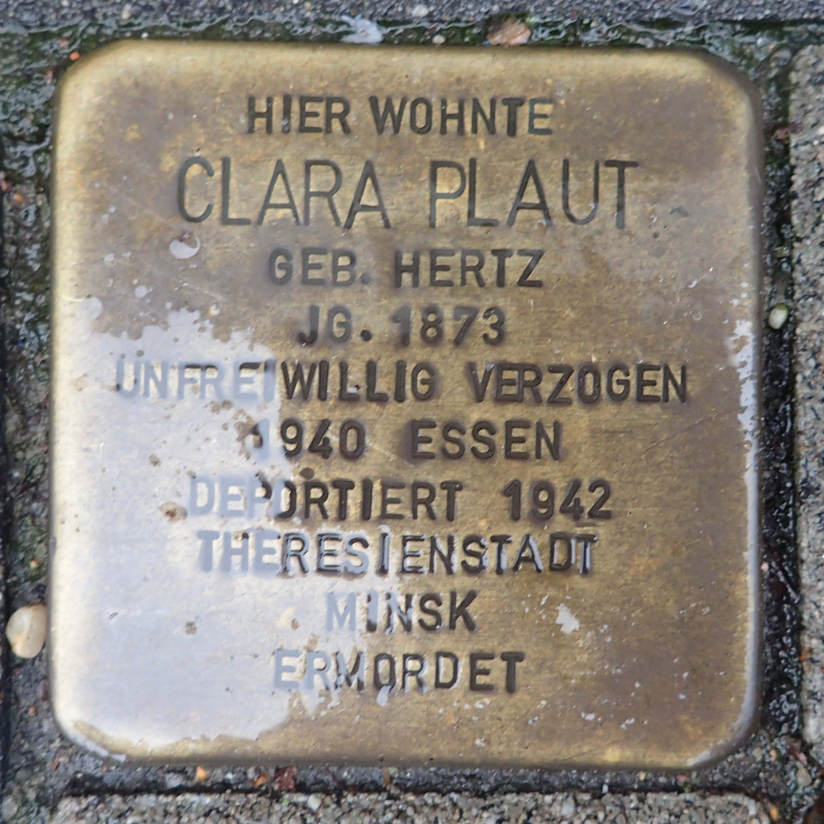 Stolperstein Geldern Nordwall 49 Clara Plaut